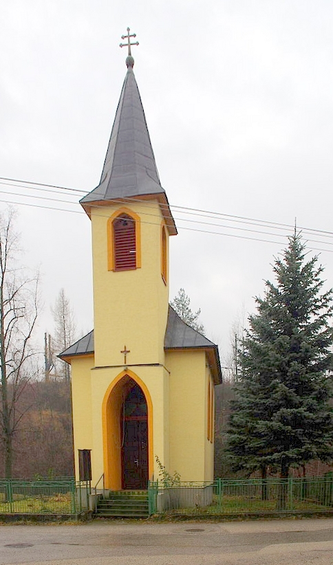 Kostol v obci